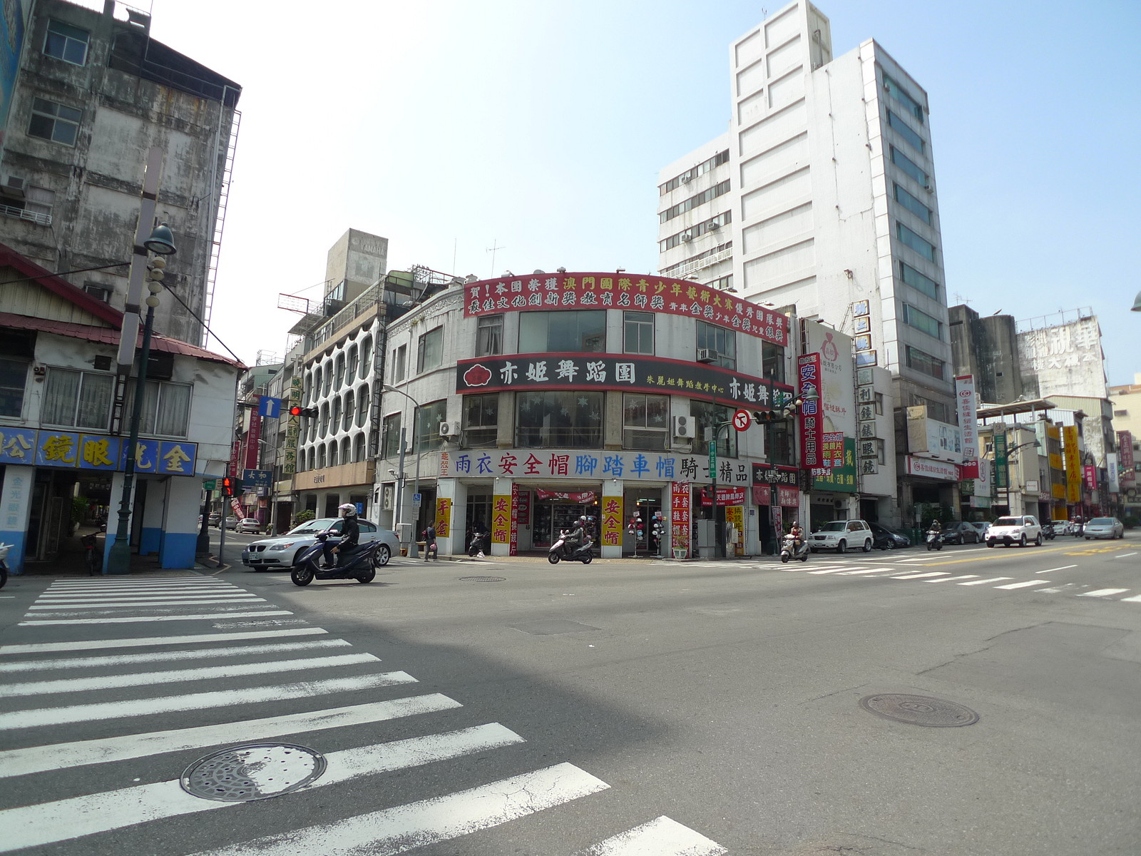 臺中市中央書局故址原建物，地址：臺中市中區中正路125號。